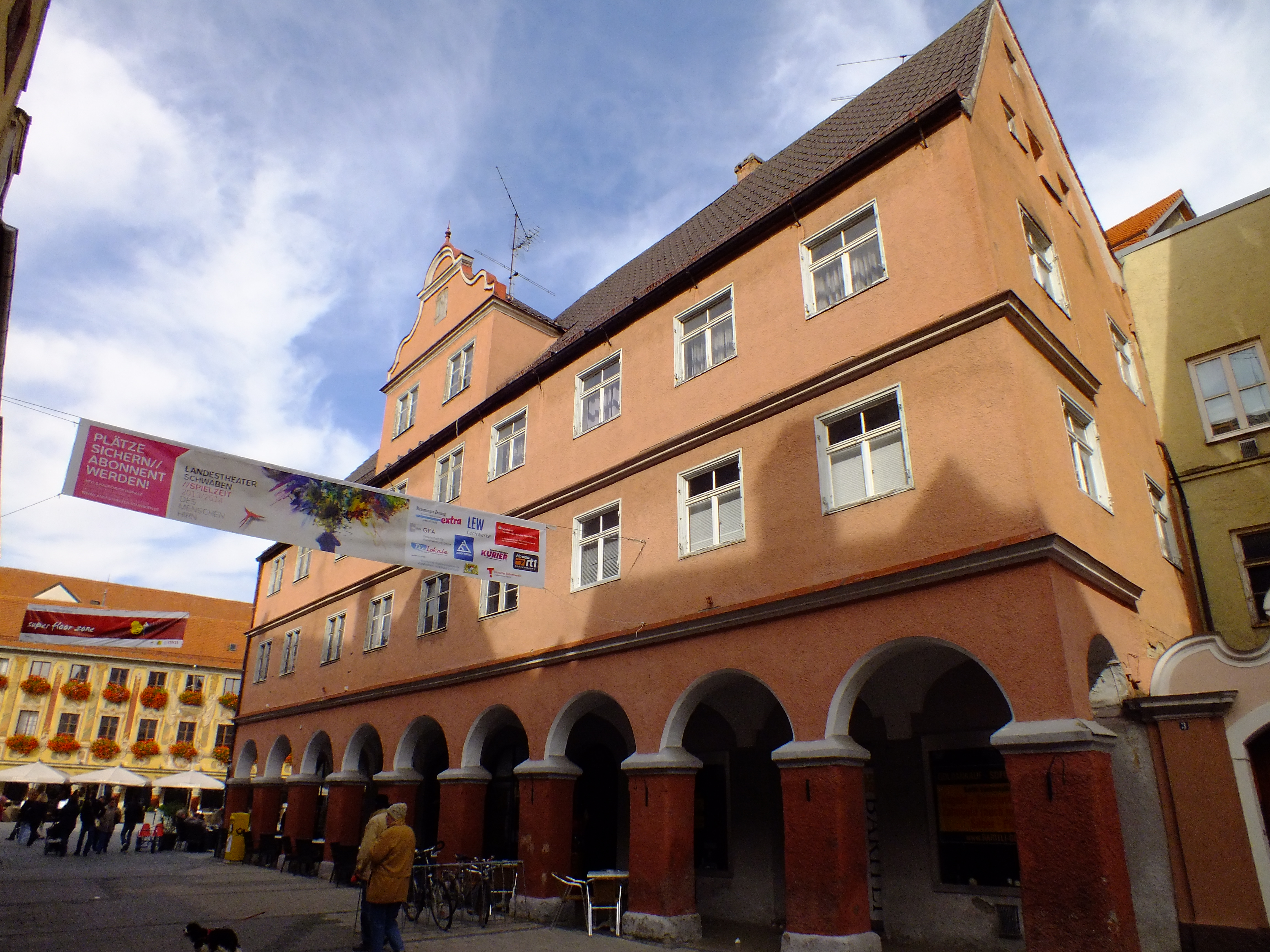 Baudenkmal im oberschwäbischen Memmingen